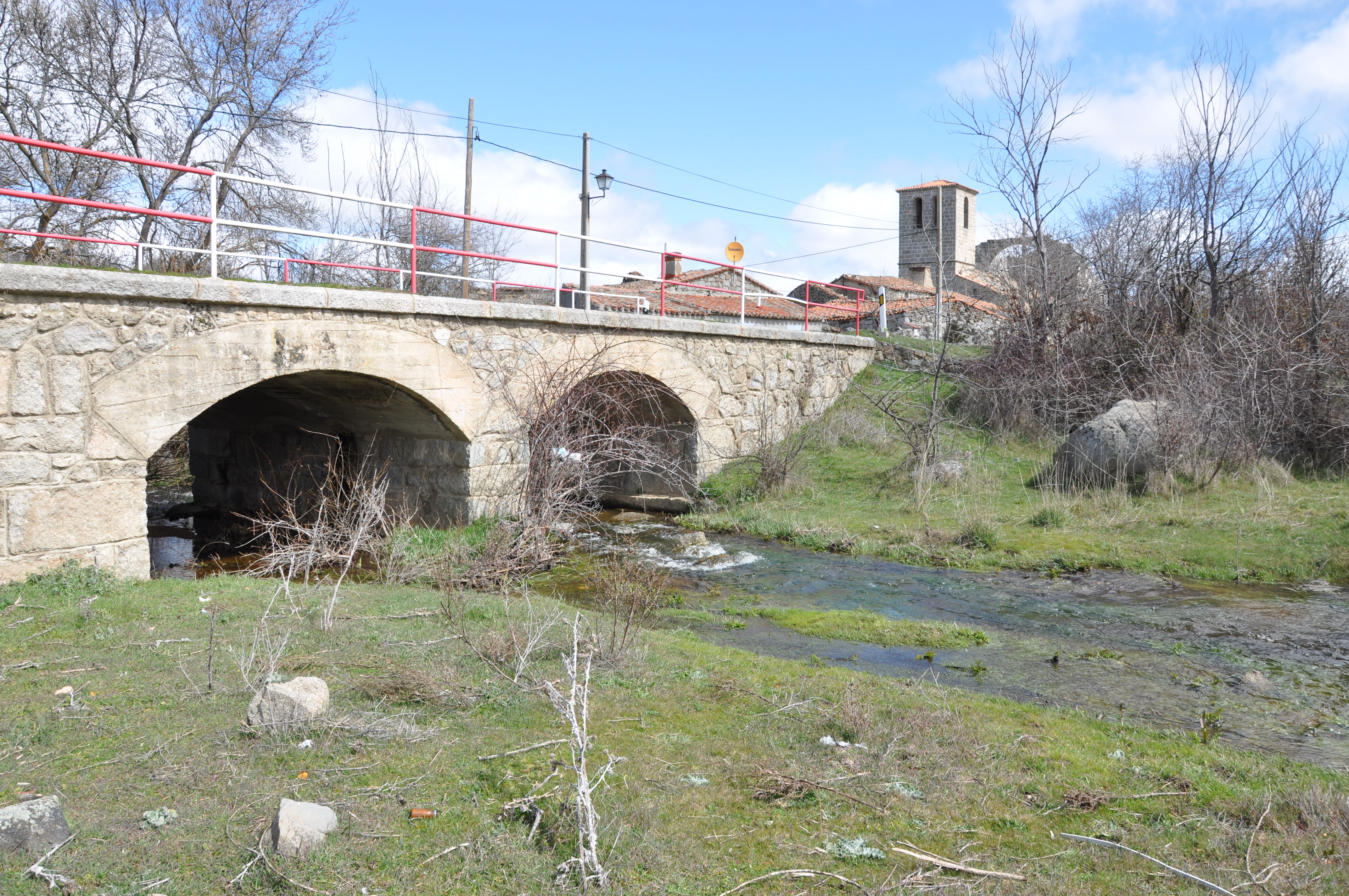 Río Navazamplón, Hurtumpascual, paso de la Cañada Real Soriana Occidental, Av, España